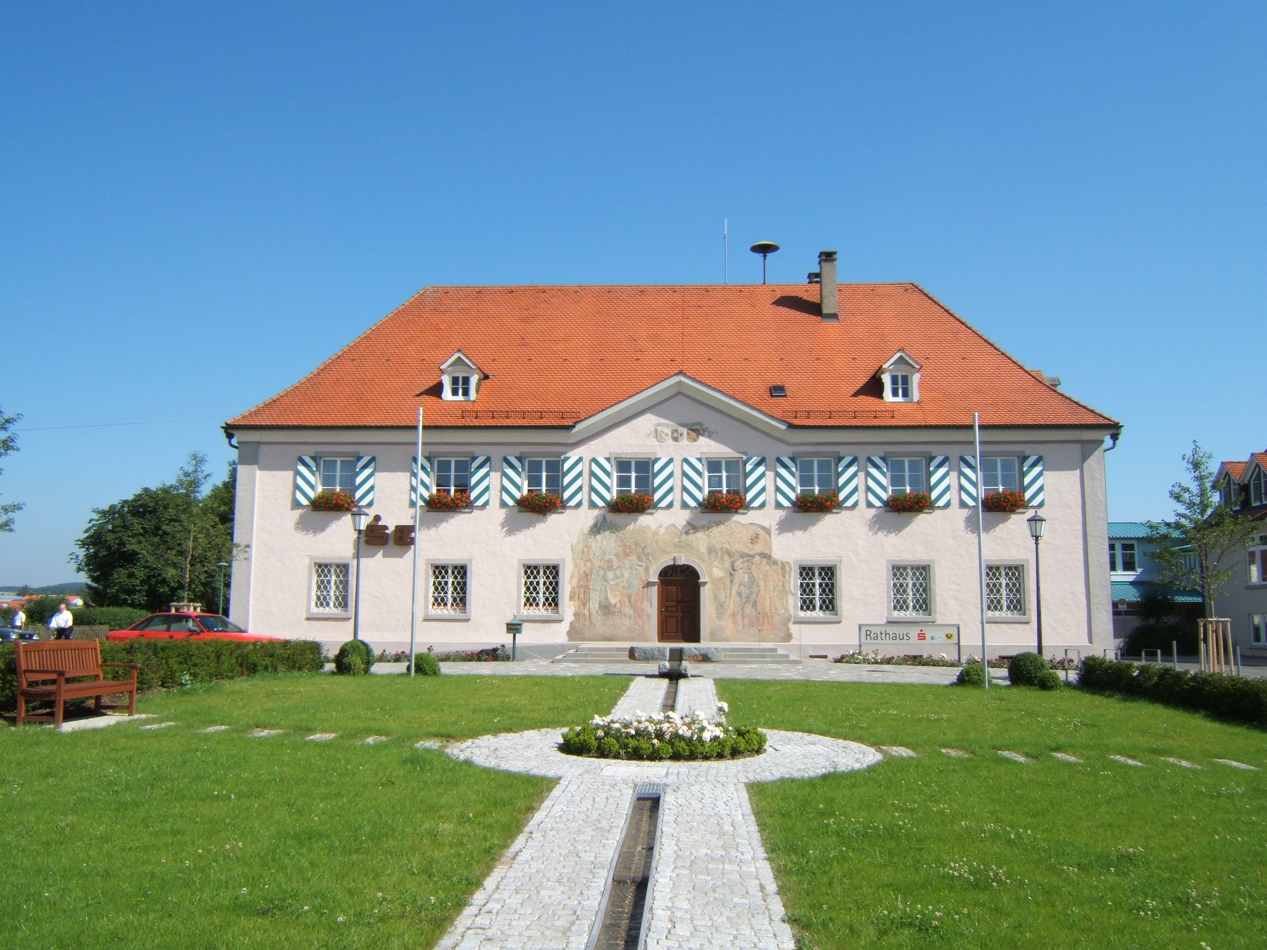 Town hall of the community of Herdwangen-Schoenach, Germany. Built in 1770 as an administrative building by the monastery of Petershausen. Rathaus der Gemeinde Herdwangen-Schönach, Baden-Wuerttemberg, Deutschland. Erbaut 1770 als Verwaltungsgebäude (Rentamt) des Klosters Petershausen.